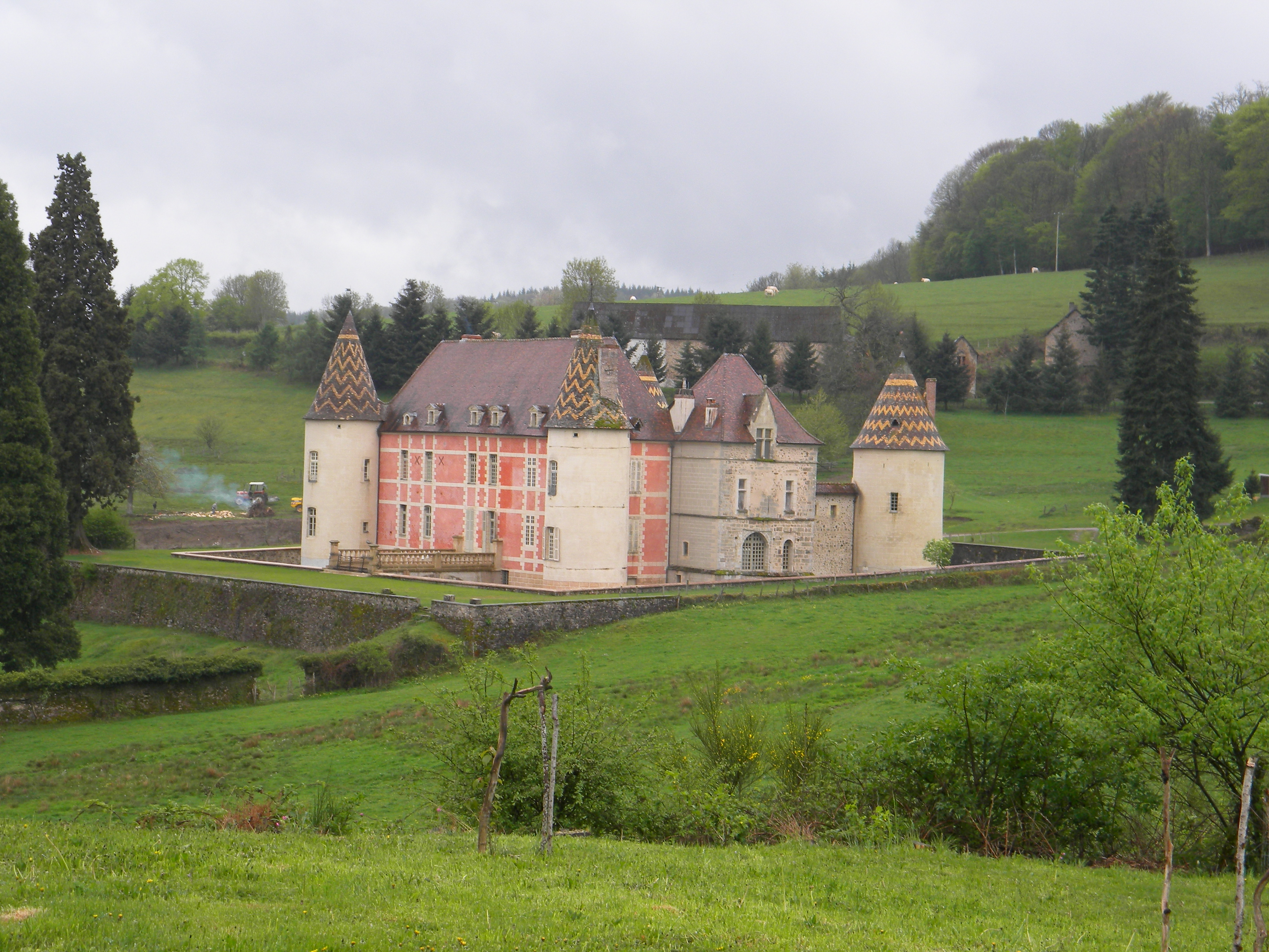 Château de Ménessaire